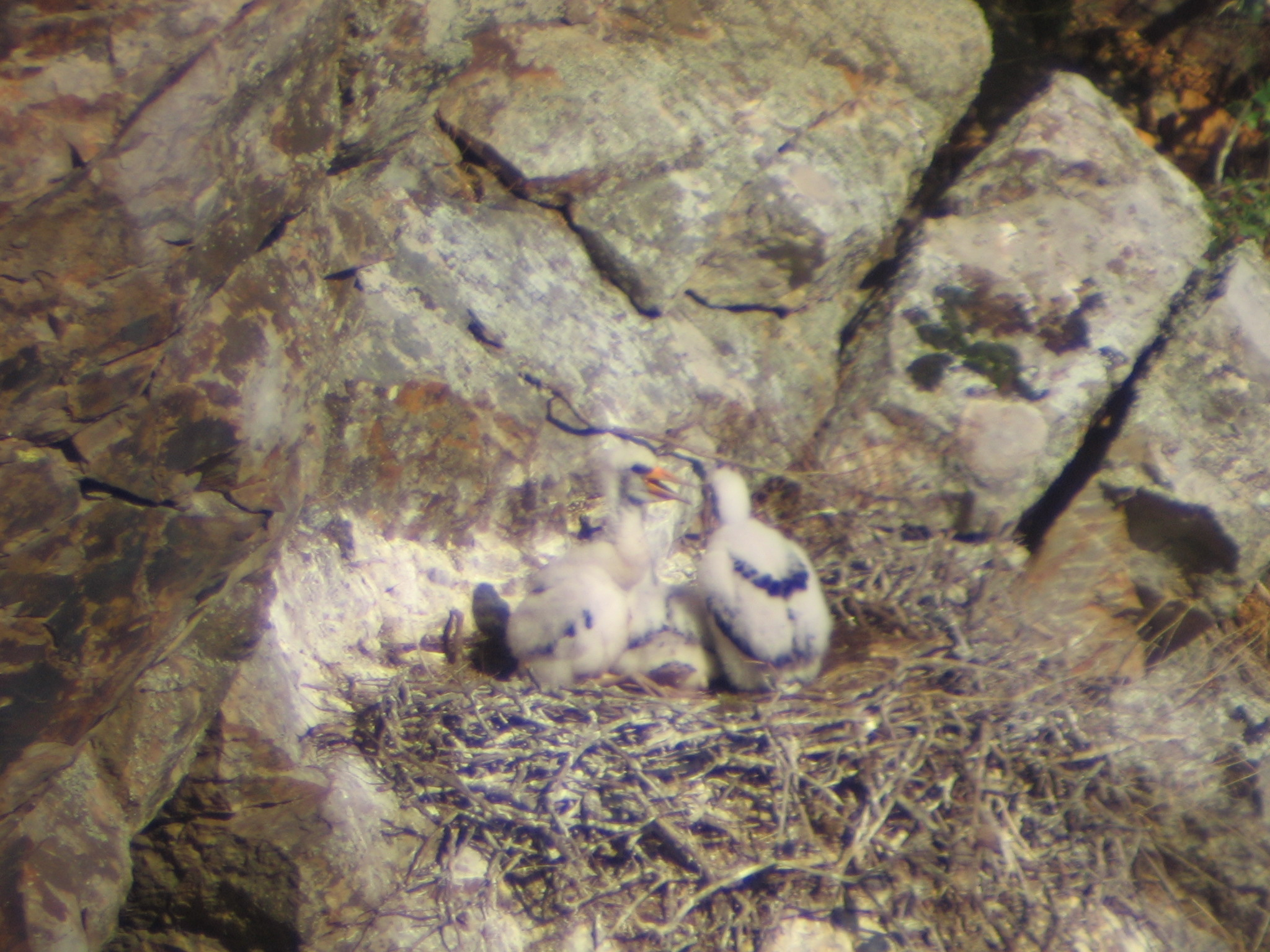 Nido de cigüeña negra (Ciconia nigra) en el Parque Nacional de Monfragüe (Cáceres)